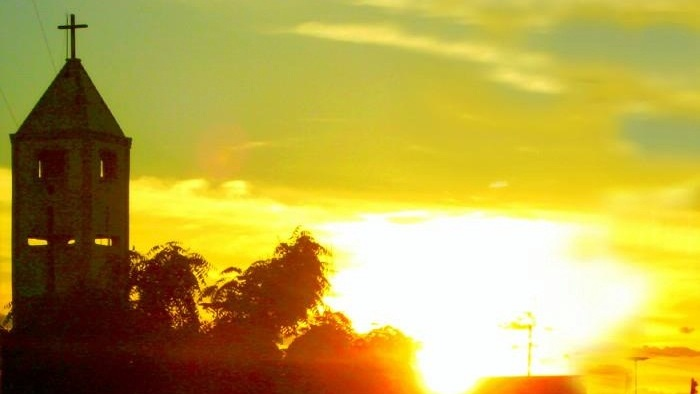 Sol se pondo ao lado da torre da Igreja de Nossa Senhora de Fátima, centro de Dirceu Arcoverde